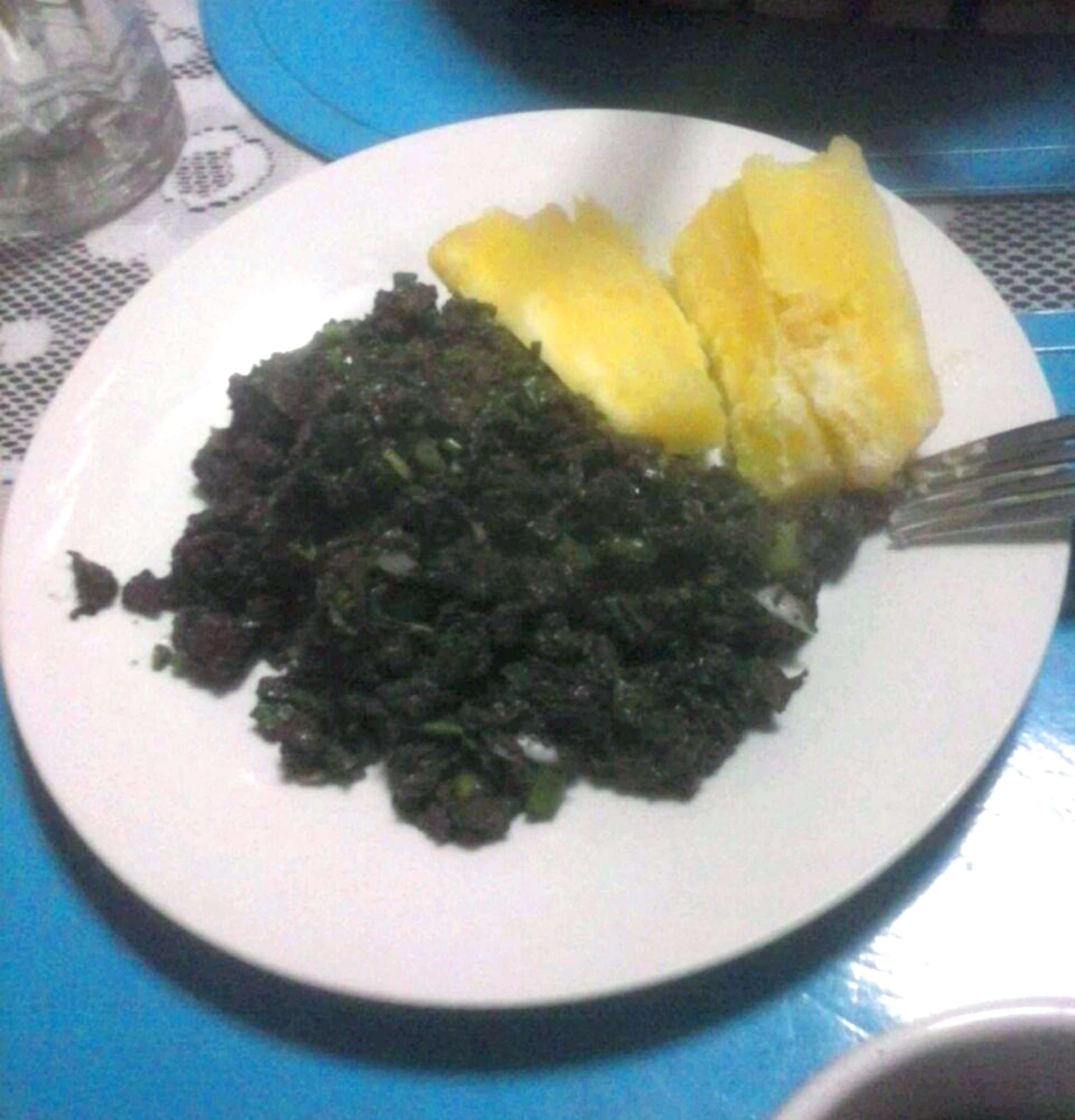 Entrada o desayuno típico de Lambayeque, Perú, hecho con sangre frita, ají y cebolla china. Se acompaña de yuca.